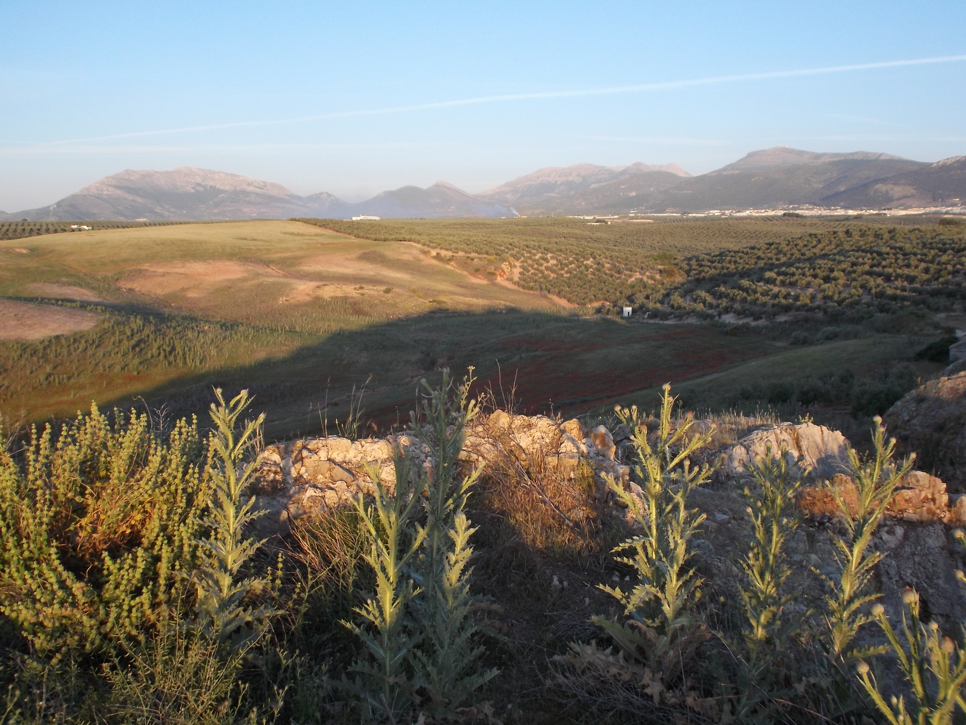 Vistas de Mancha Real y Sierra Mágina desde Torrechantre.